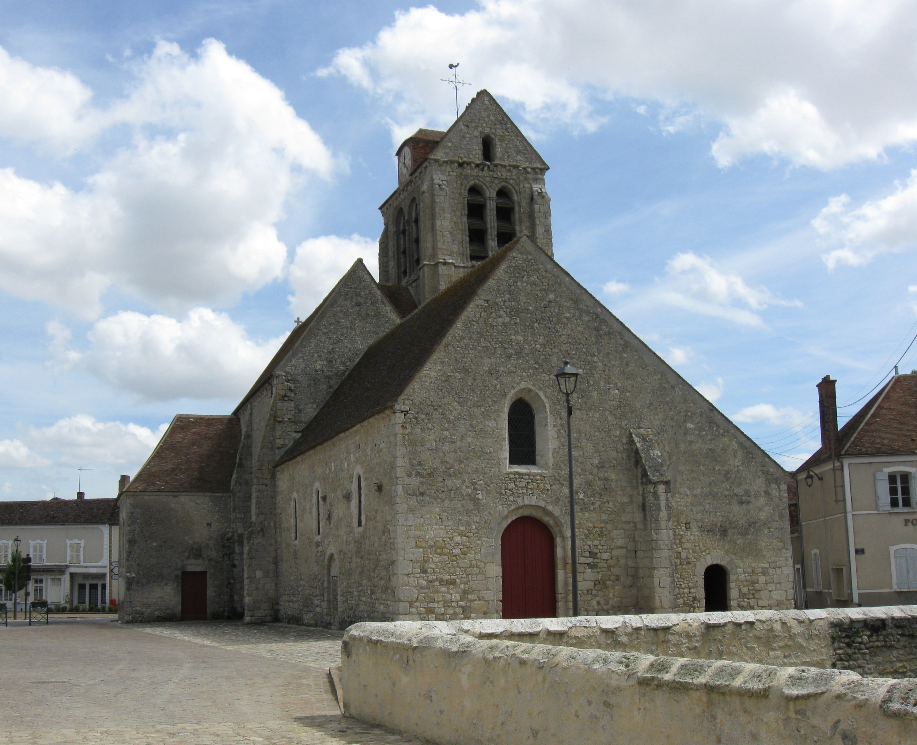 Église Saint-Barthélemy. (Beaumont-du-Gâtinais, département de la Seine-et-Marne, région Île-de-France).